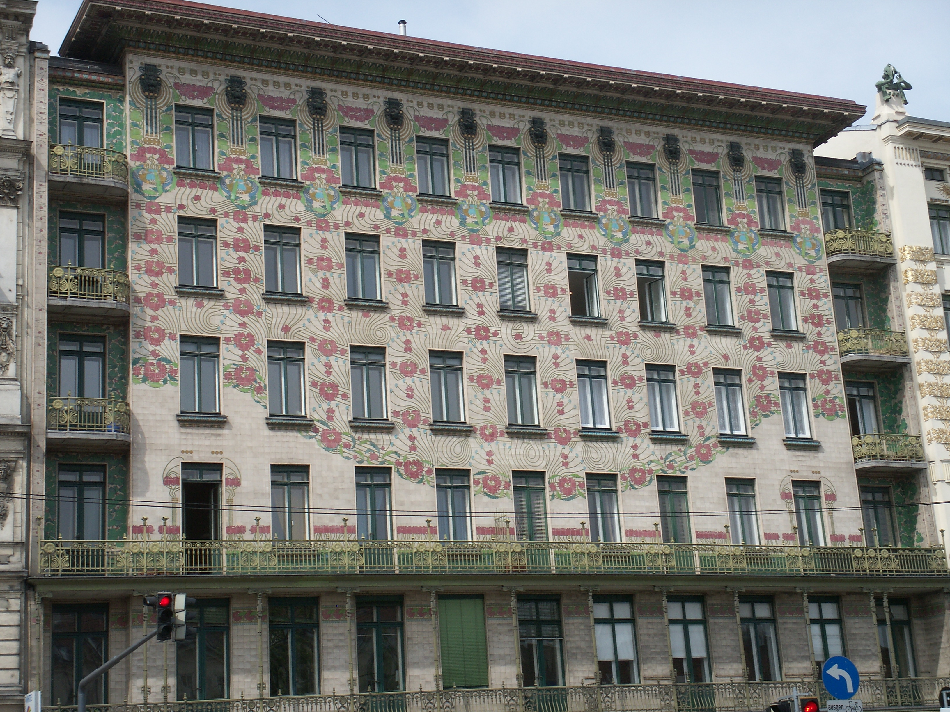 Wien, Majolikahaus Wienzeile 40; Otto Wagner